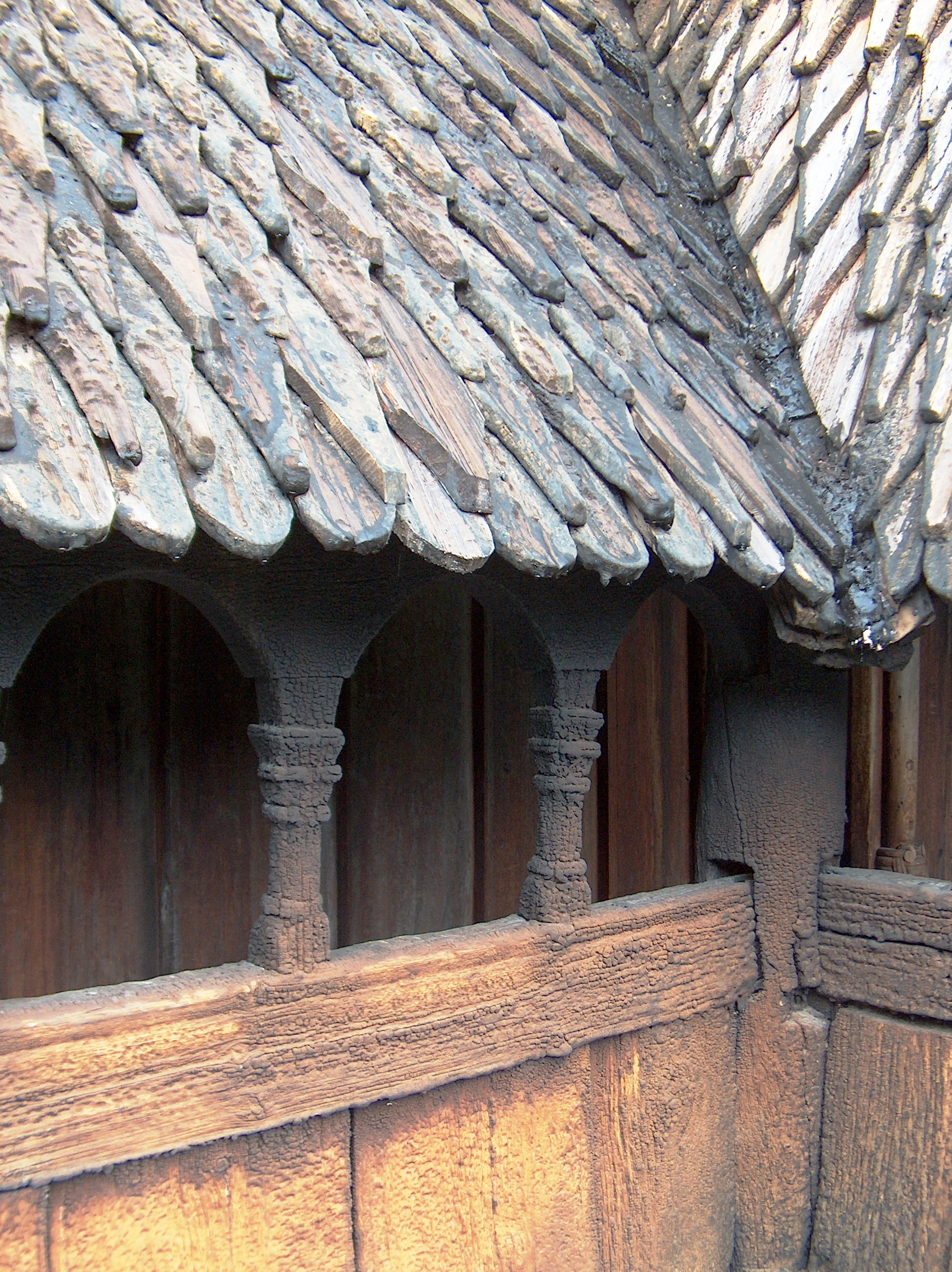 Borgund stavkirke utv. detalj